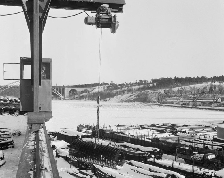 Liljeholmen mot Årstaviken/Årstabron. Söderberg och Haaks nya rörmagasin (Europas största). Lager i det fria.